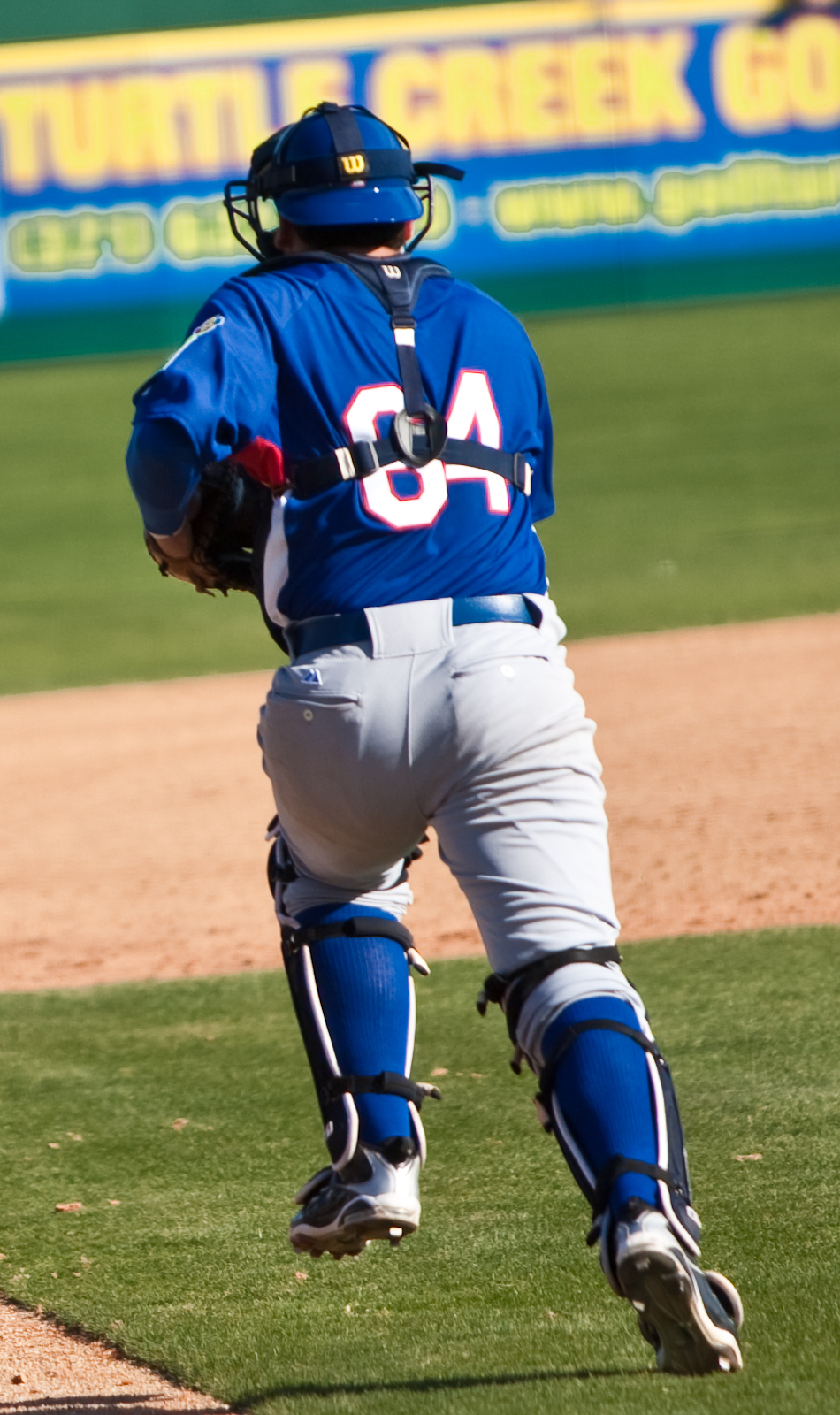 Francisco Cervelli